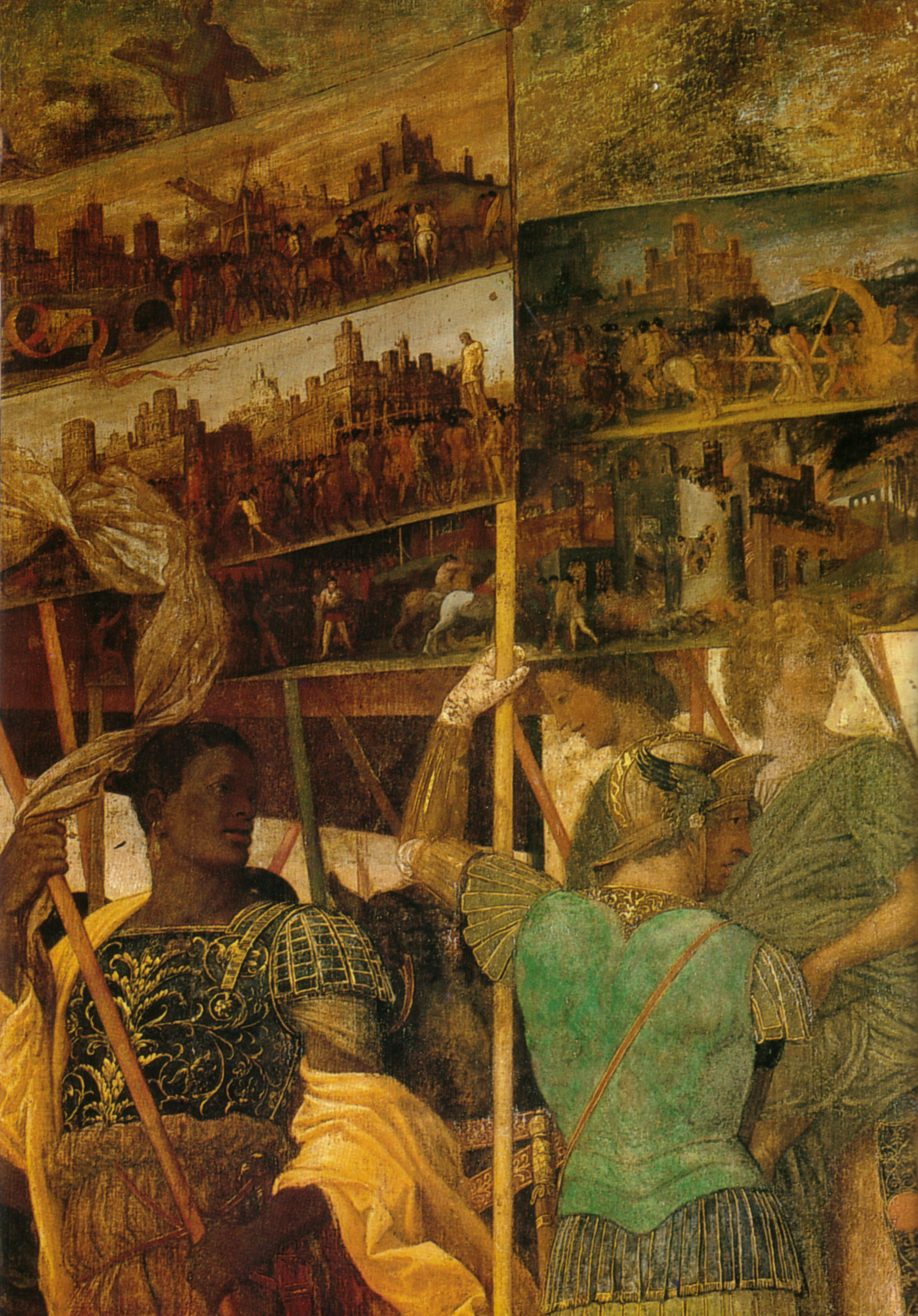 detail